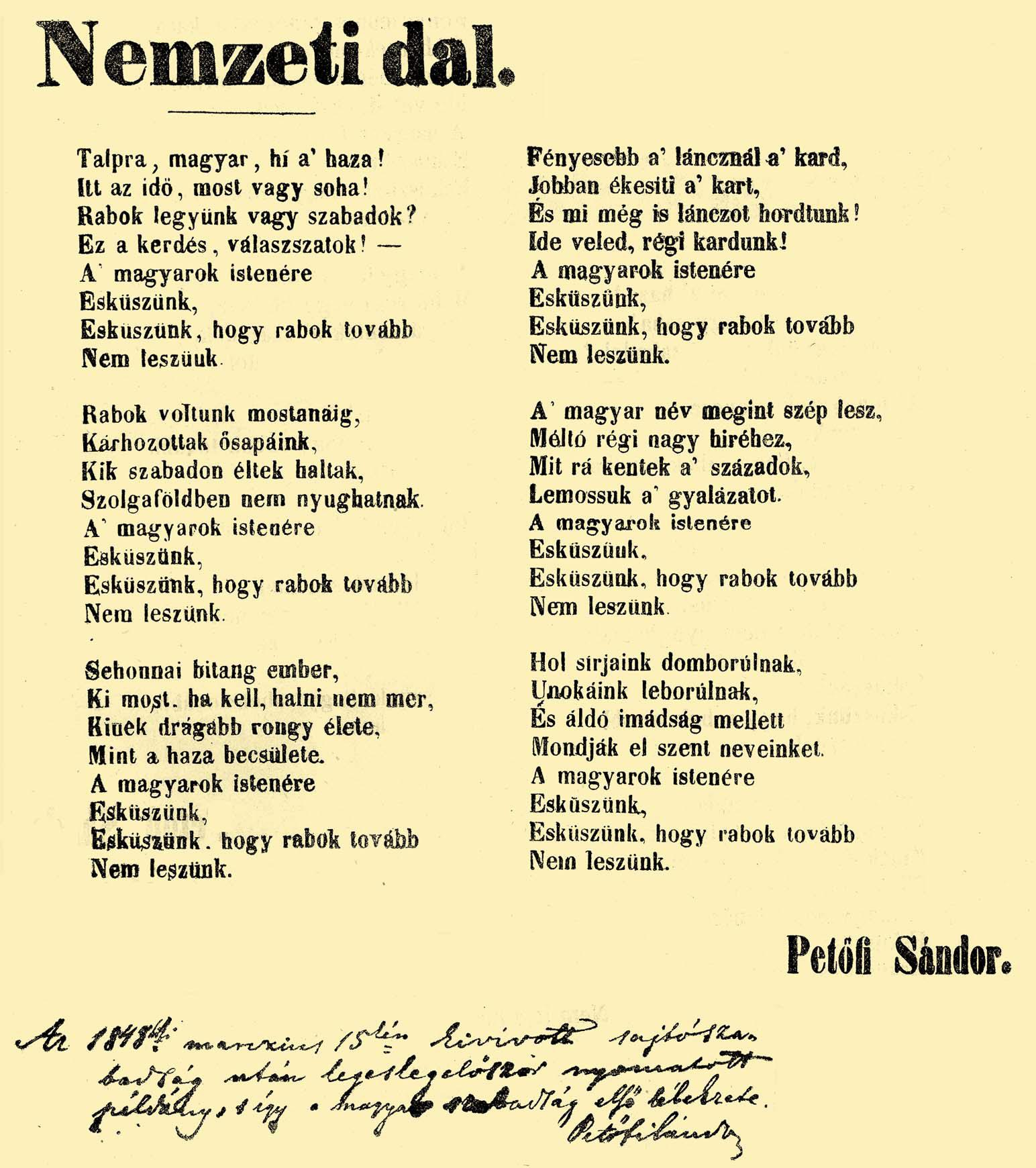 A nemzeti dal nyomata